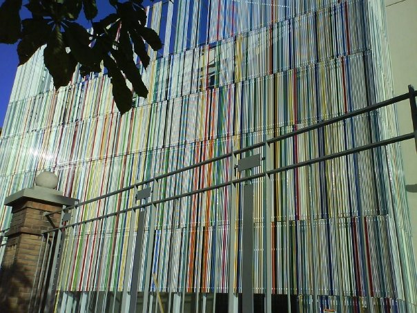 Façade de l'Exploradôme sur la place du Marché de Vitry-sur-Seine